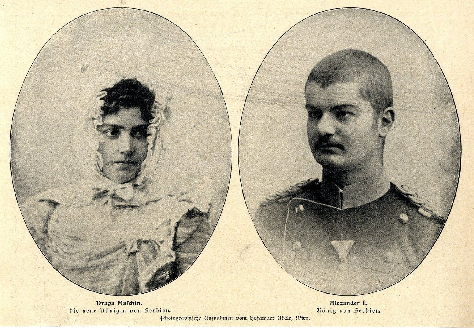 Draga Mašin & Alexander I. König von Serbien, 1900Depicted people: Draga Mašin and Alexander I of Serbia